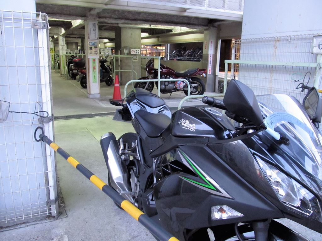 オートバイ用駐車場。駐輪場。二輪車用。